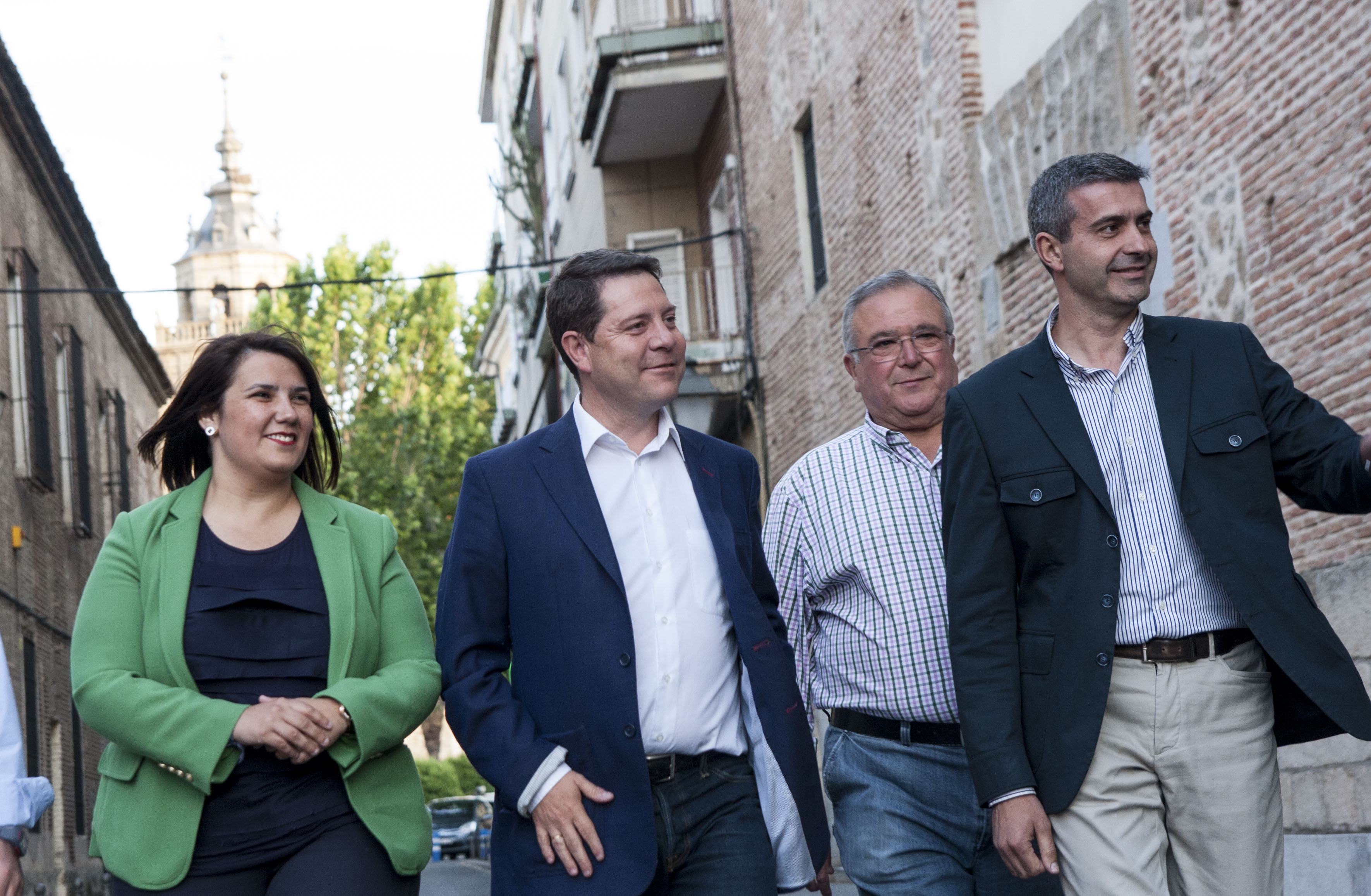 Acto público en Talavera de la Reina